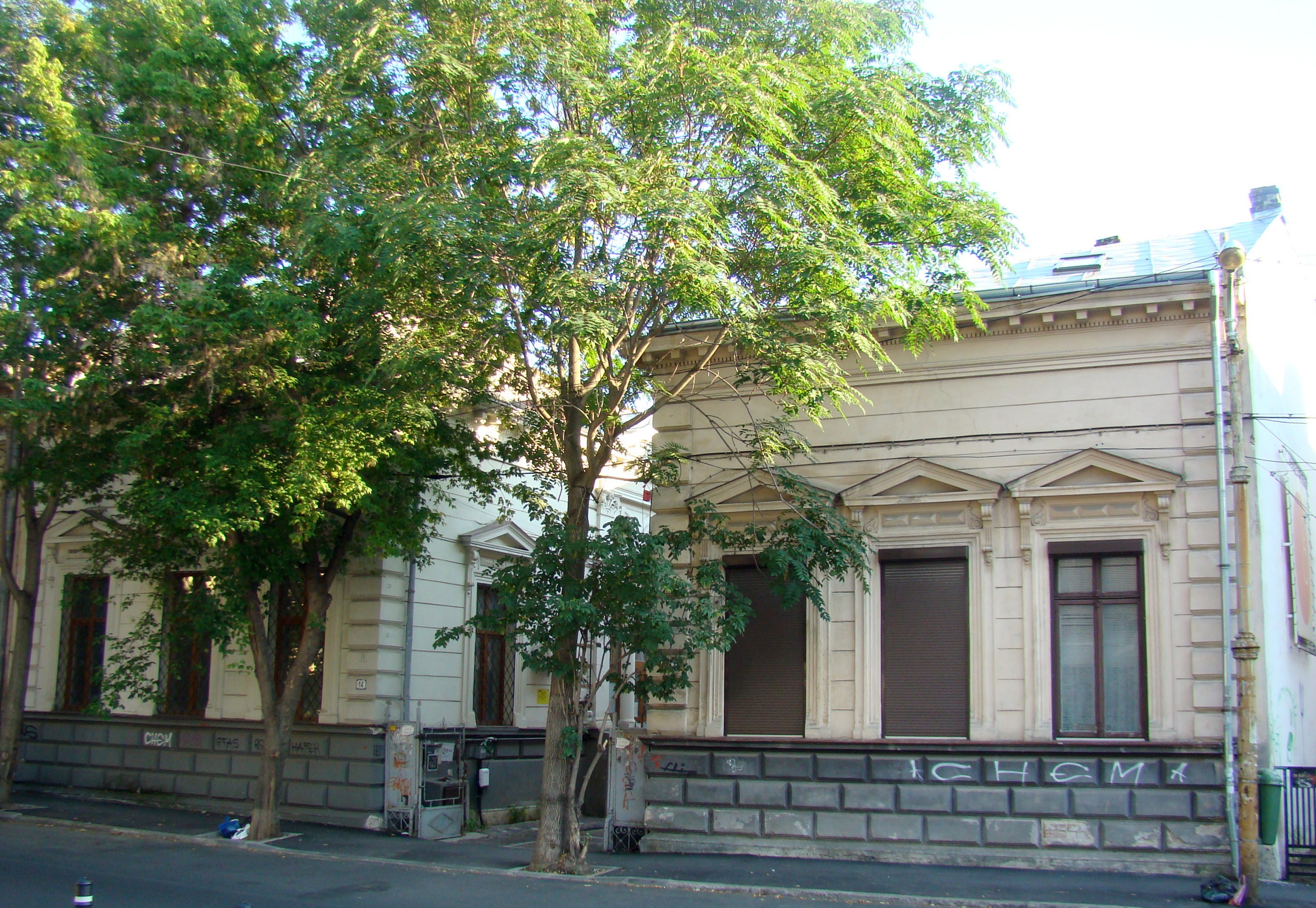 Casă monument istoric, str. Constantin Budișteanu, nr.12-14